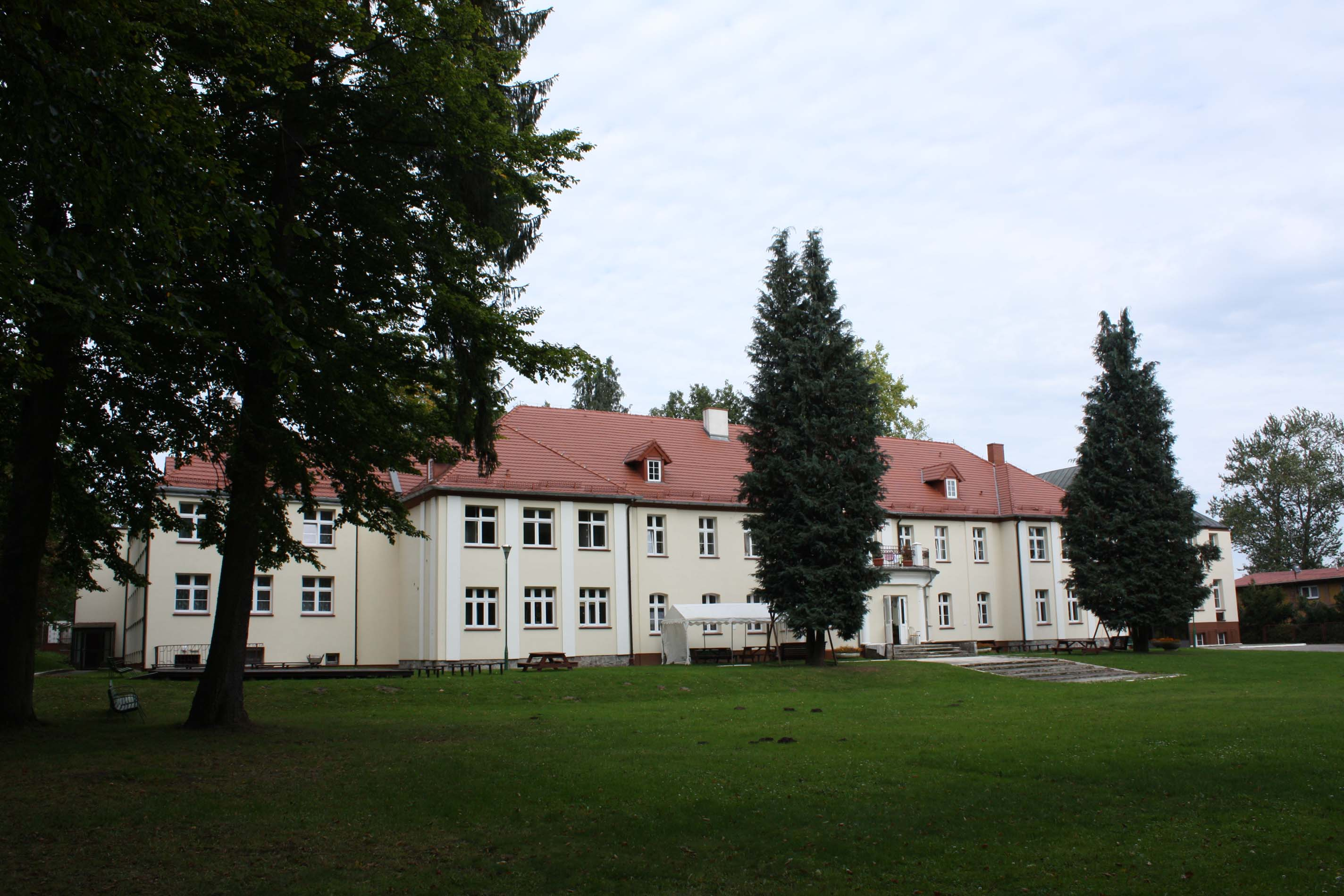 Pałac w Nowych Bielicach (nr rejestr. 386)